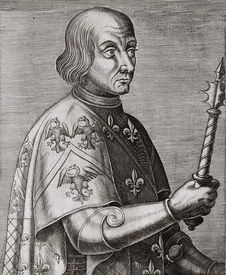 Louis II de La Trémoille, gravure ornant l'ouvrage d'André Thévet, Les vrais pourtraits et vies des hommes illustres grecz, latins et payens, 1584. Cette gravure a probablement été composée à partir du gisant de La Trémoille « et d'un portrait au crayon aujourd'hui perdu. Louis avait en effet commandé un ensemble de monuments funéraires qui ornaient la crypte de la chapelle de Thouars » (Laurent Vissière [1]).